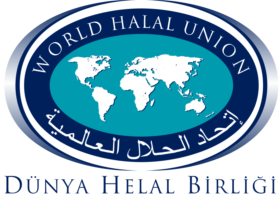 Sürdürülebilir denetim, huzurlu tüketim